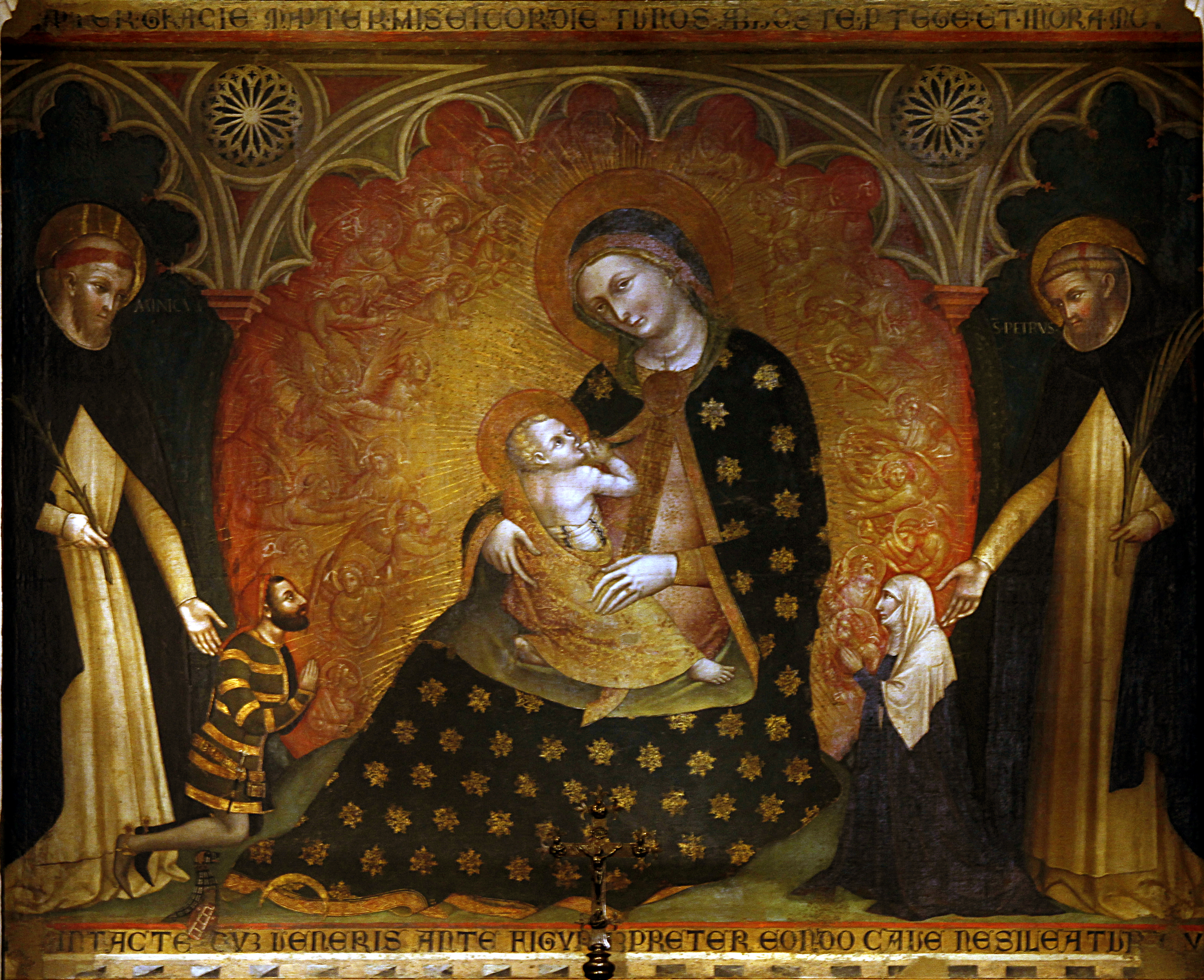 Sant'Anastasia - Verona